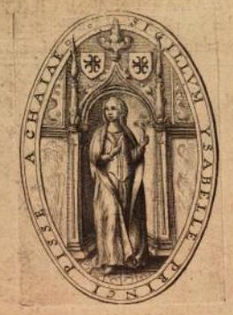 Isabela z Villehardouinu